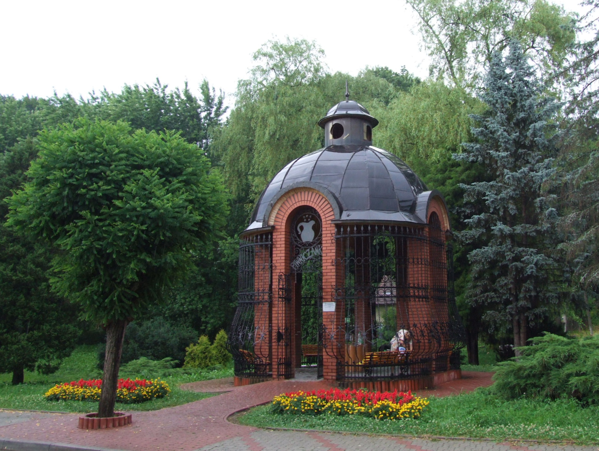 Piwniczna-Zdrój. Pijalnia wód mineralnych "Piwniczanka".